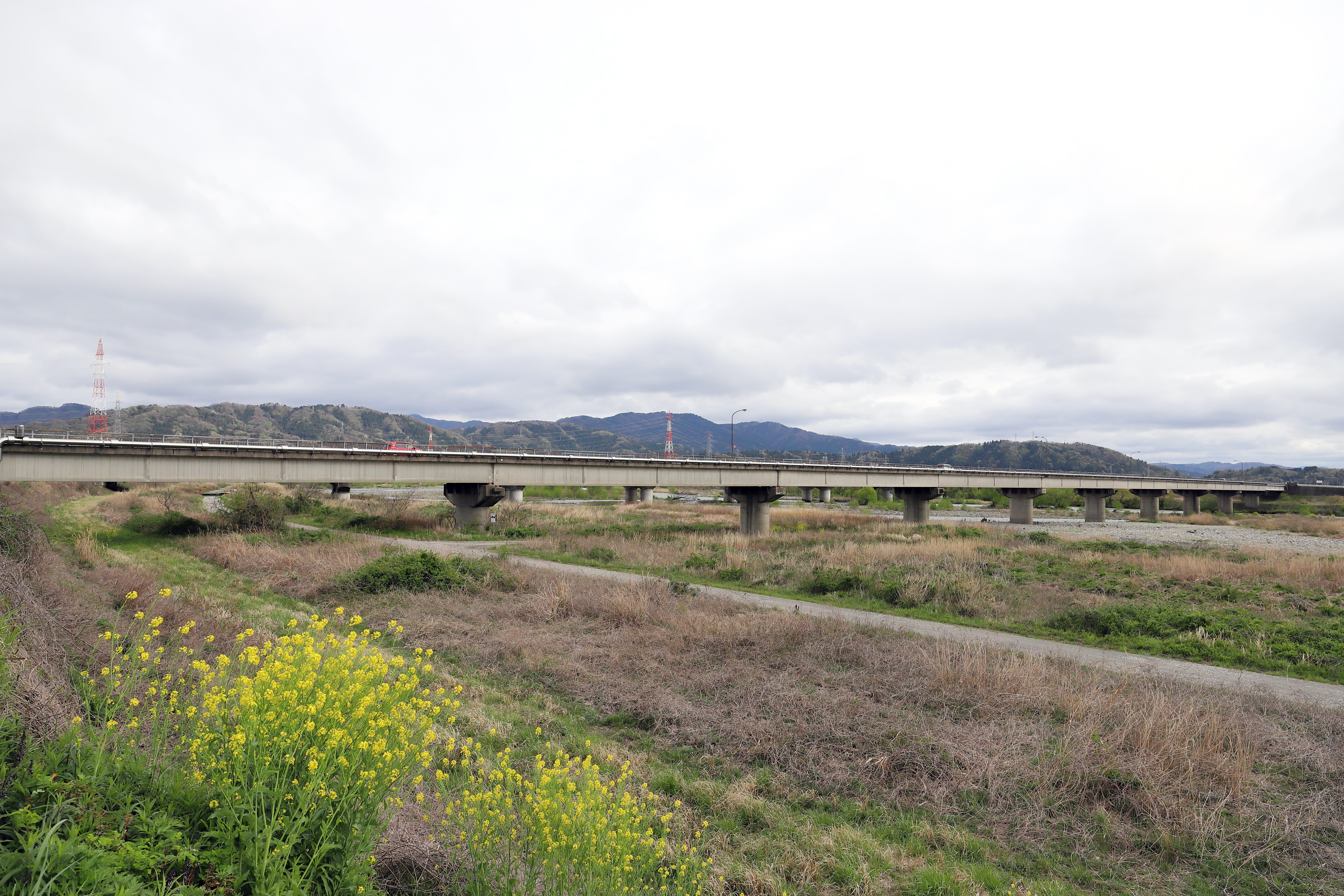 九頭竜川に架かる福松大橋 福井県道164号大畑松岡線 Canon EOS 6D Mark II